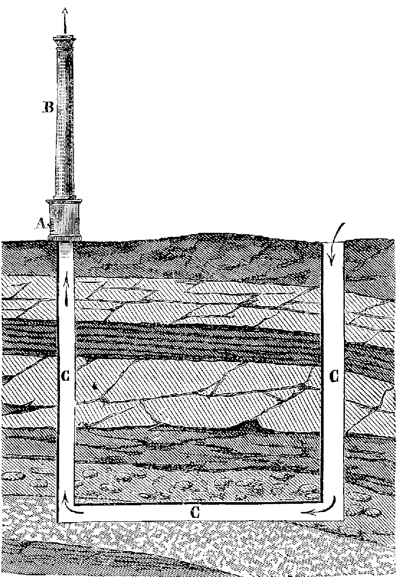 Ventilation des mines par une cheminée d’appel